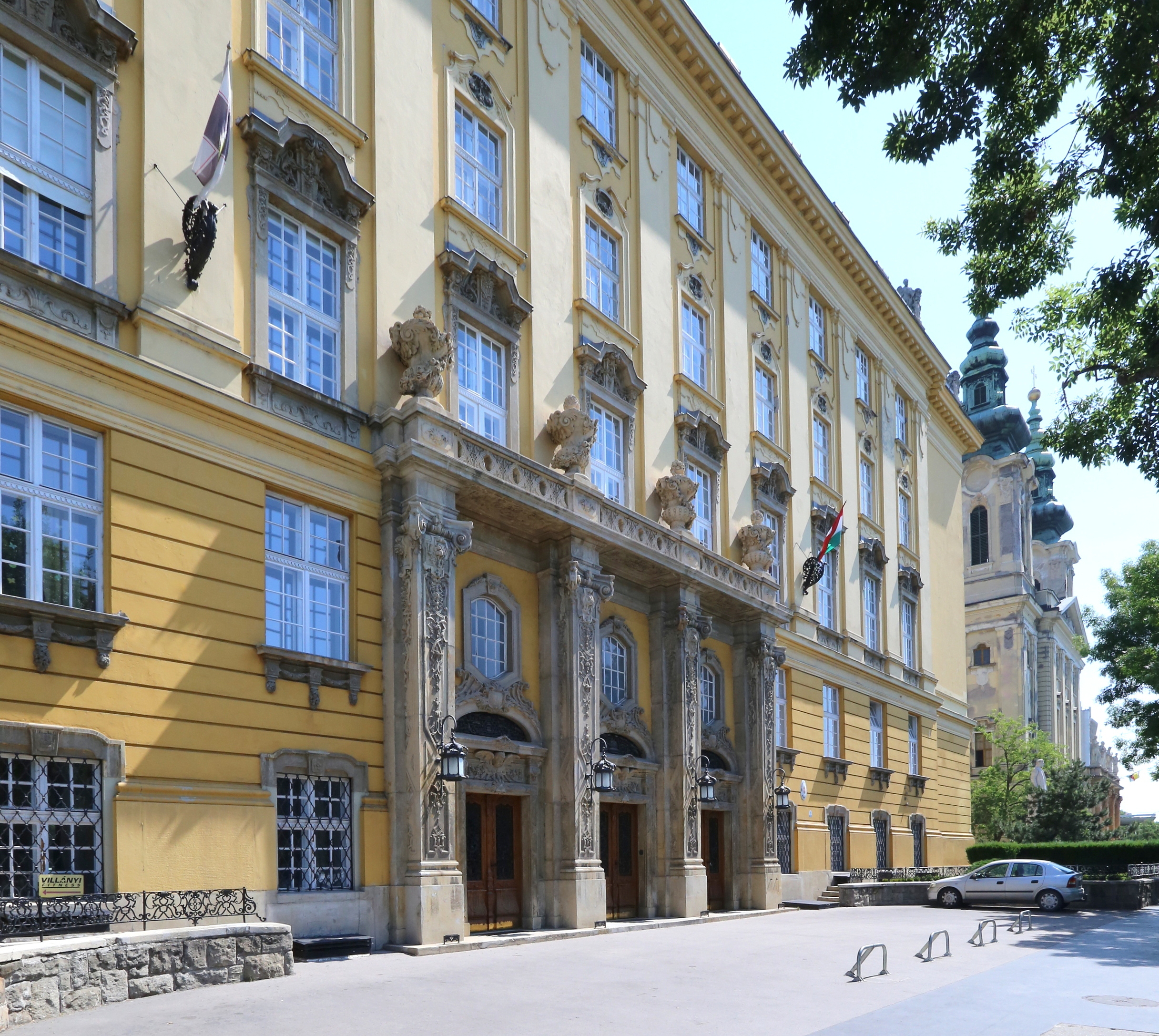 Szent Imre Gimnázium (Budapest 11)